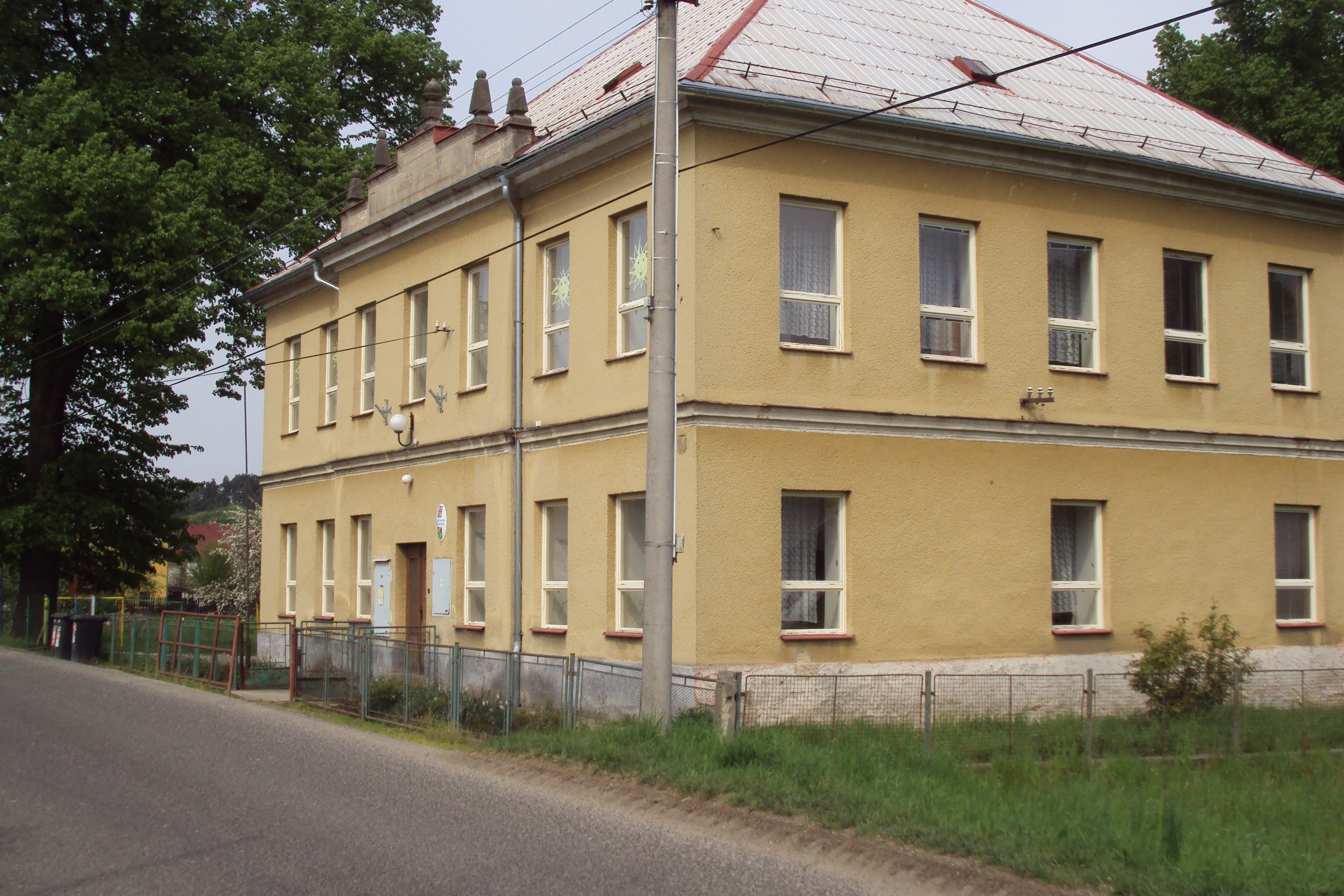 Obecná škola ve Velkém Grunově u Brniště